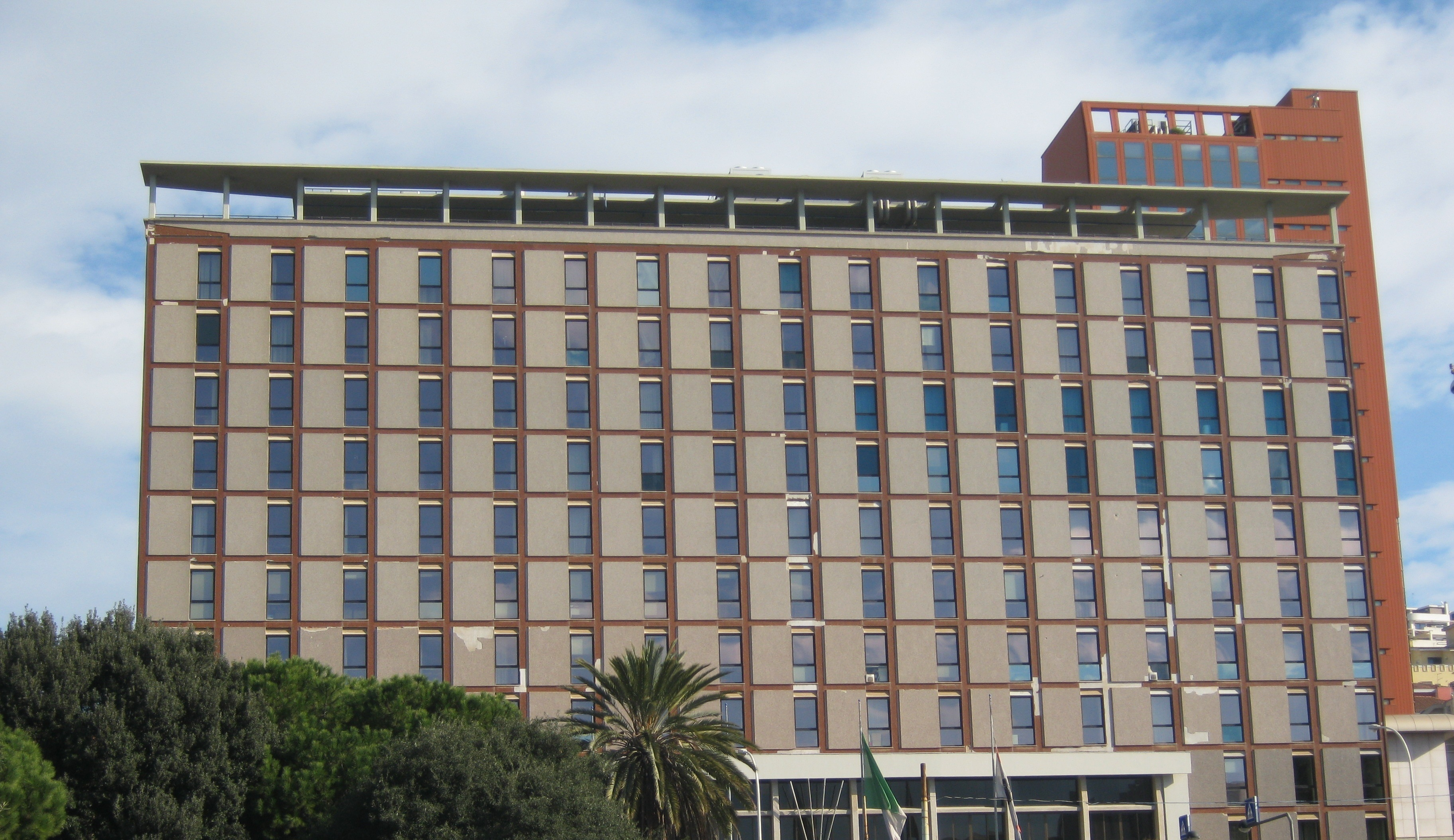 Palazzo della regione Autonoma della sardegna Sardu: Fotografia de su palatzu de sa Regione Autònoma de sa Sardigna